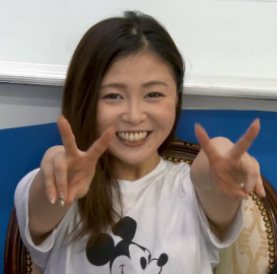 瑞森しゅんです。